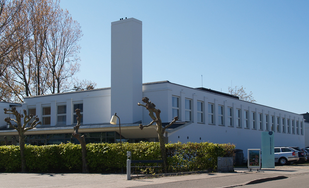 Øresundsakvariet